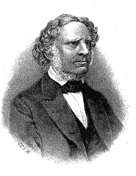 Karl Karmarsch, Stahlstich, aus dem Buch: Karl Karmarsch: Erinnerungen aus meinem Leben, Hannover 1879